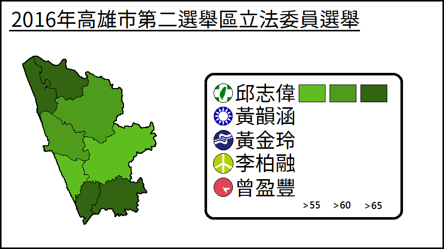 2016年高雄市第二選舉區立法委員選舉得票